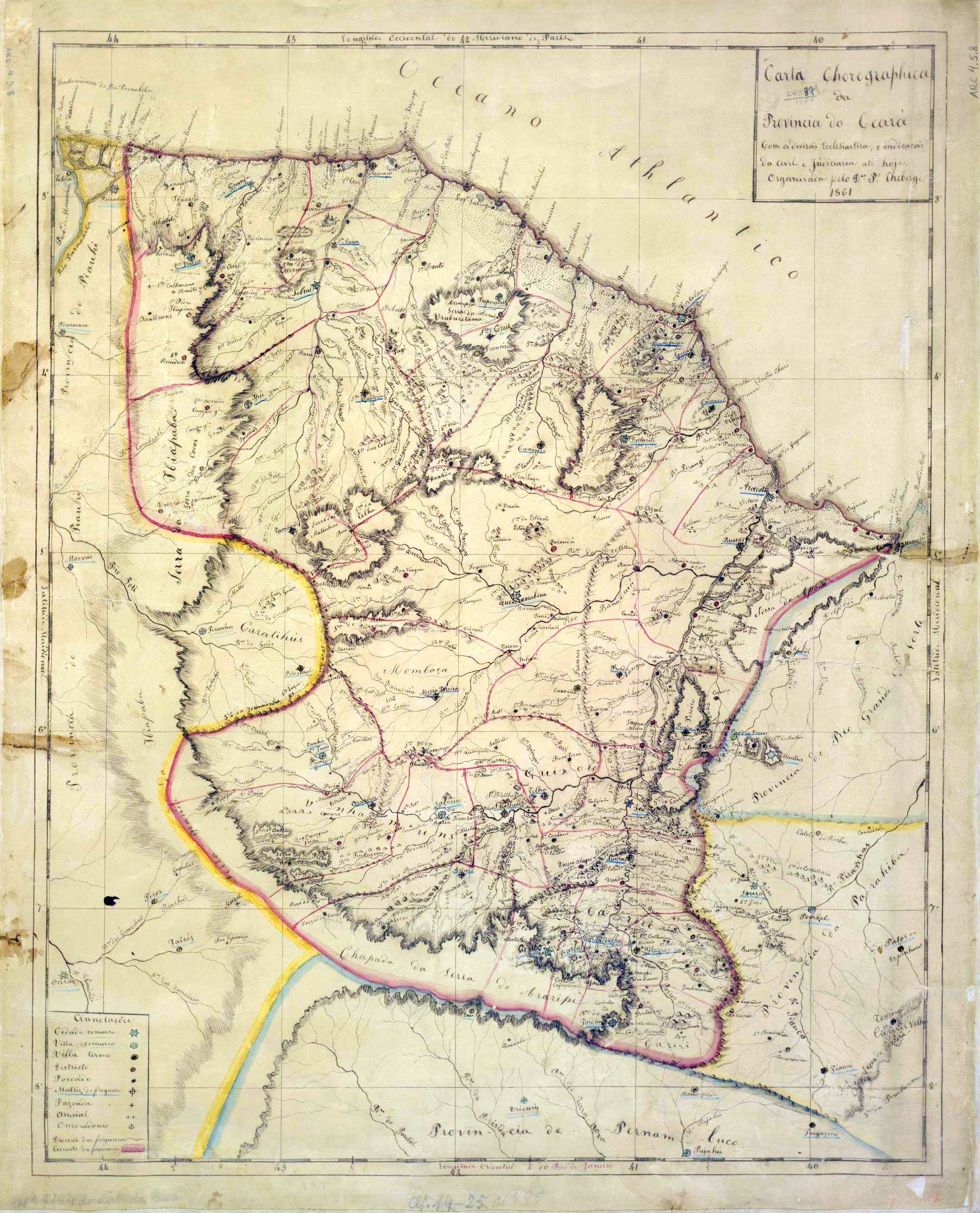 Mapa da "Província do Ceará com a divisão eclesiastica, e indicação da civil e jurídica até hoje, organizado pelo Dr. Pedro Théberge" de 1861.